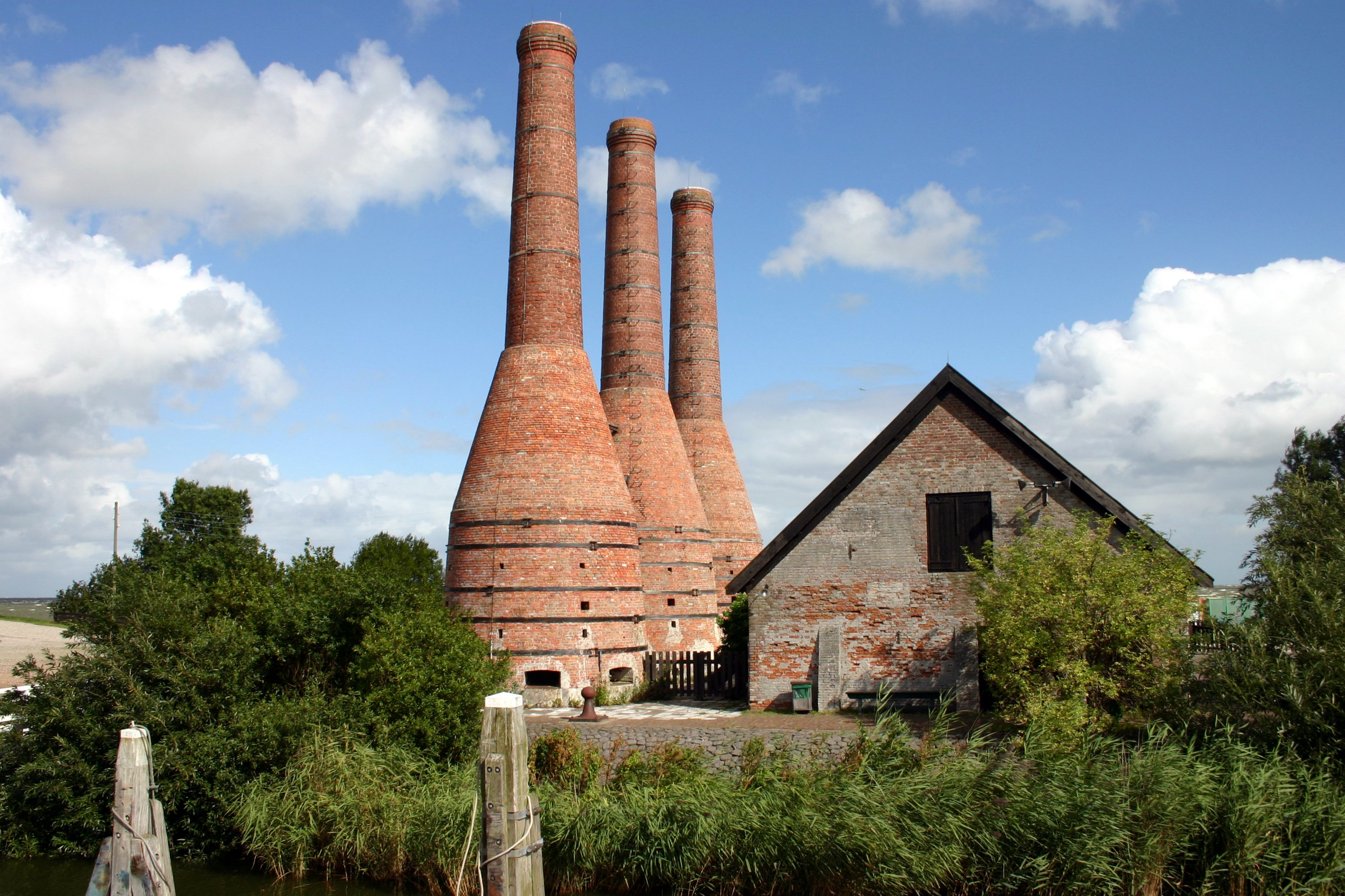 Description Kalkovens Akersloot in Zuiderzeemuseum te EnkhuizenDate 16 September 2005Source Own workAuthor P. Brundel Kalkovens Akersloot in Zuiderzeemuseum te Enkhuizen